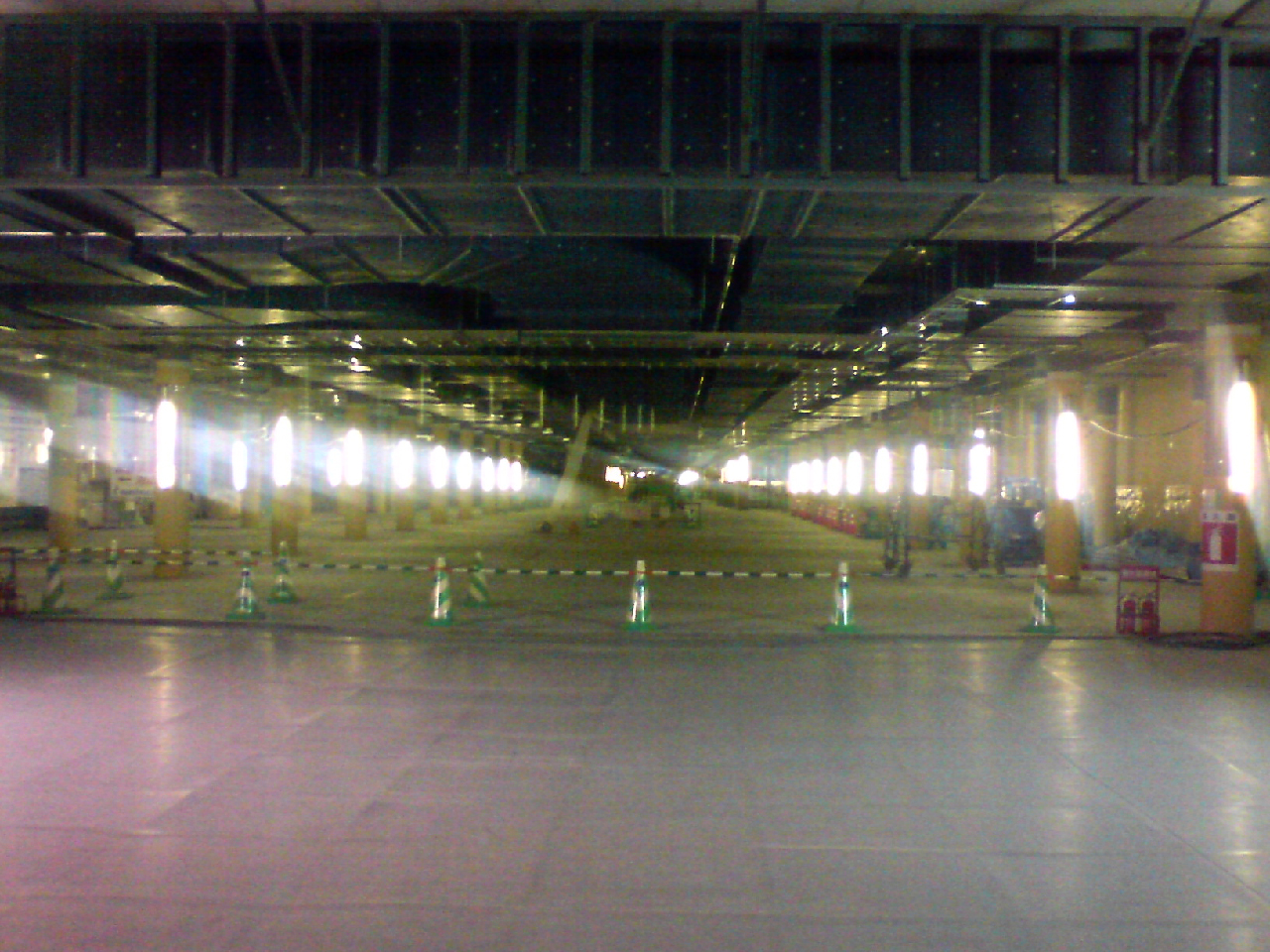 札幌駅前通地下歩行空間工事中の様子（大通駅からさっぽろ駅方面）